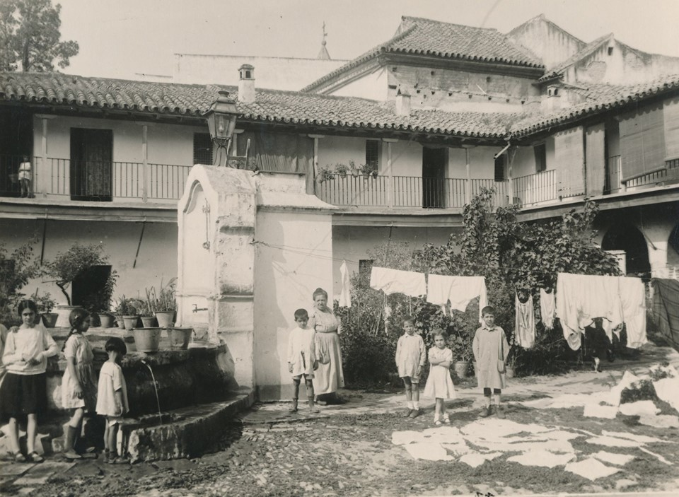 Vista del Corral del Agua (Corral de vecinos), en Sevilla.